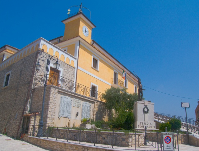 Il municipio ed il monumento ai caduti di Pesco Sannita (BN).